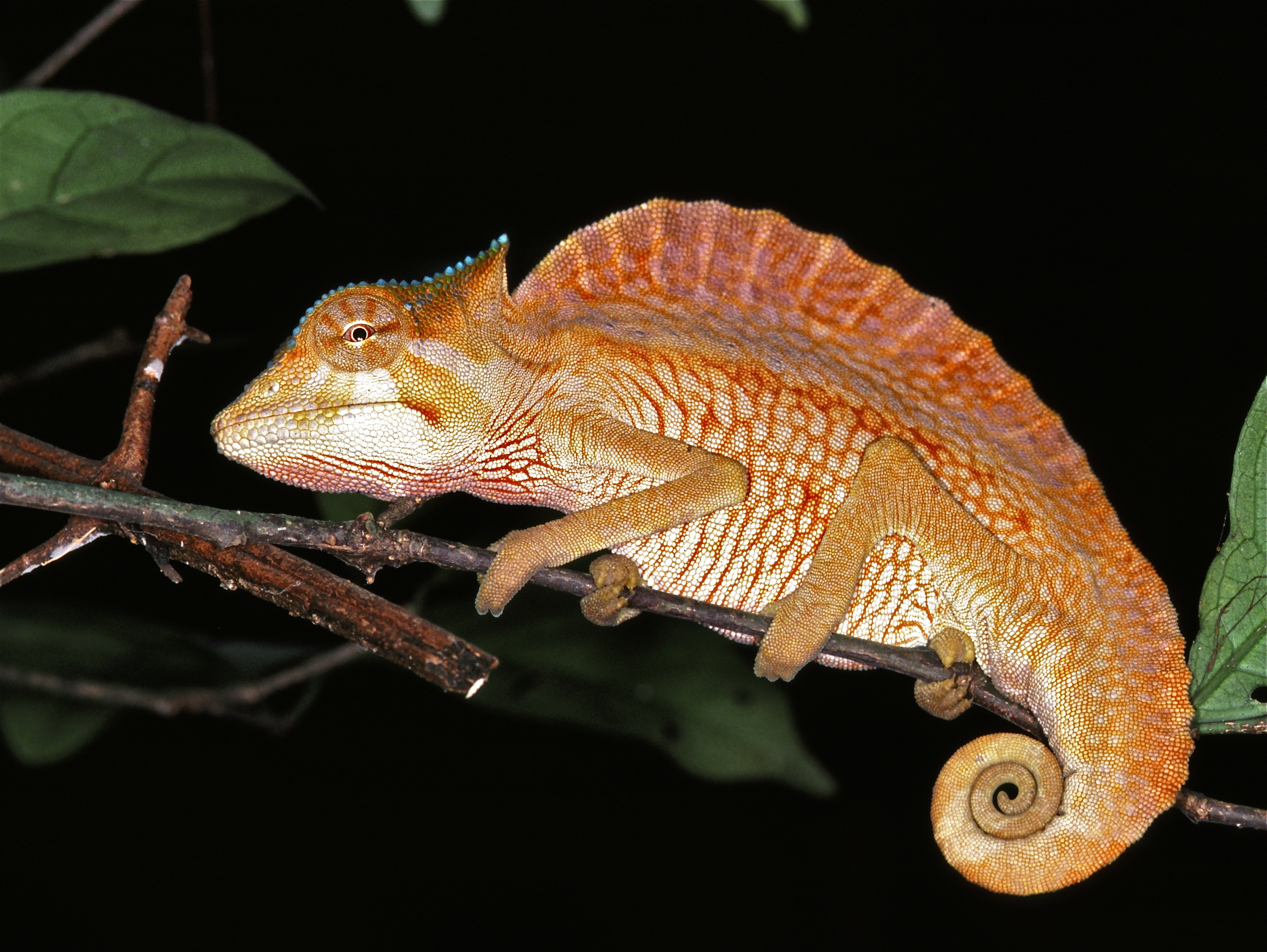 Korup NP, CAMEROON